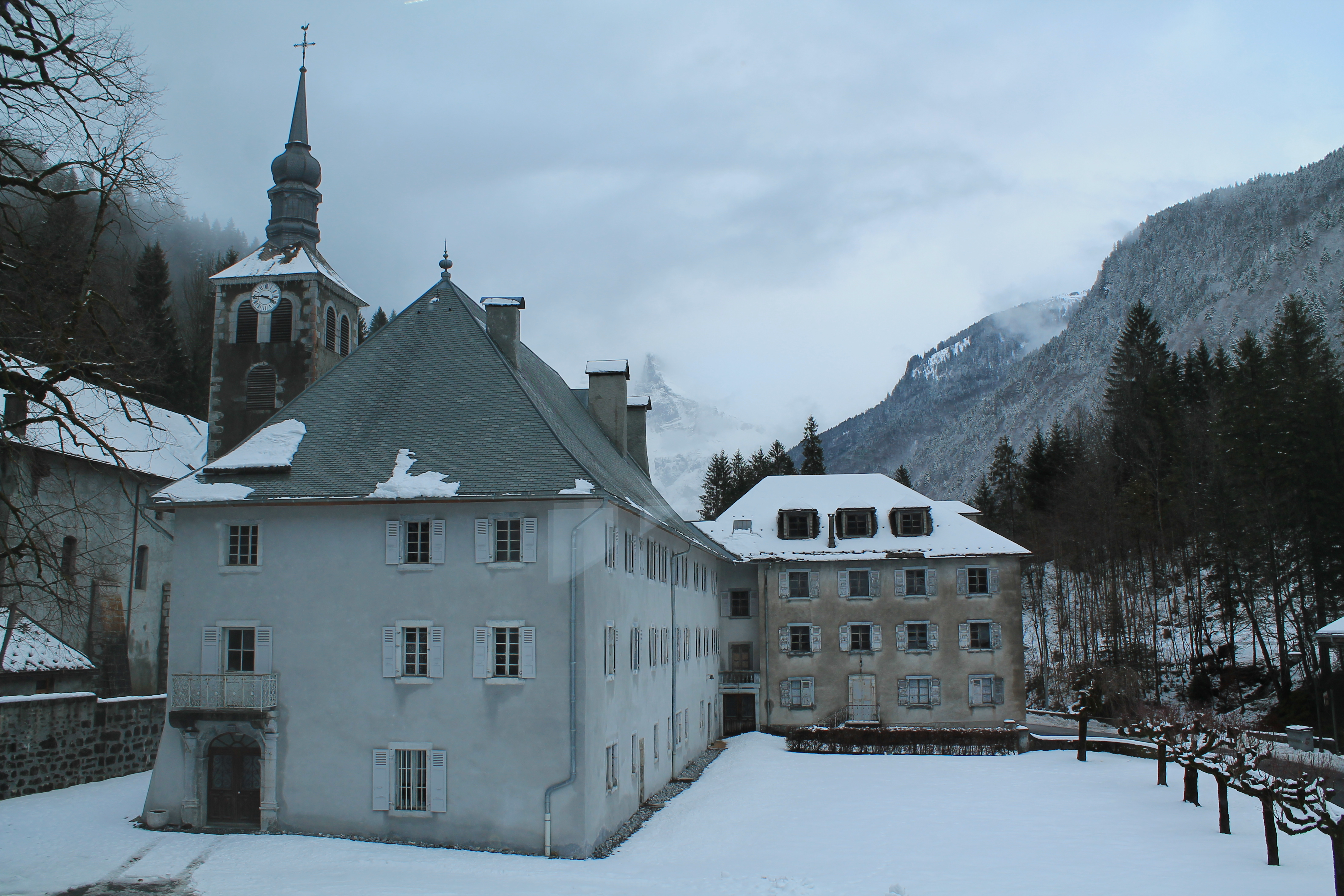 Vue de l'abbaye au premier plan, du clocher de l'église (à gauche) et de l'ancien hôtel du Fer-à-Cheval (sur la droite) en hiver.